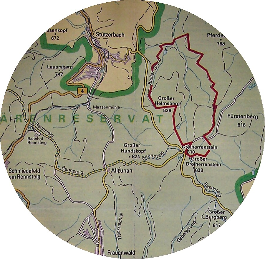 Karte des Naturschutzgebietes Marktal & Morast